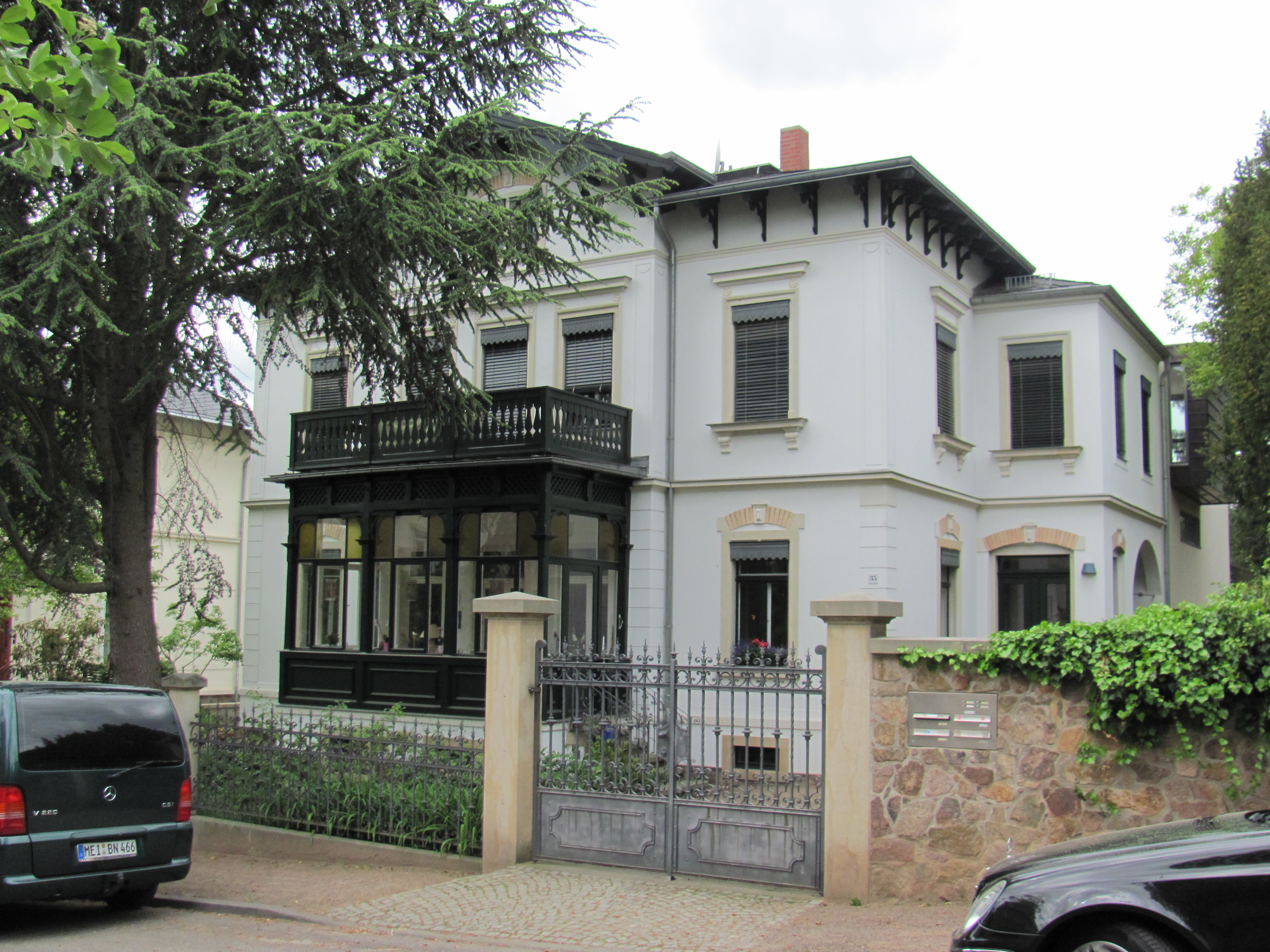 Niederlößnitz Kulturdenkmale